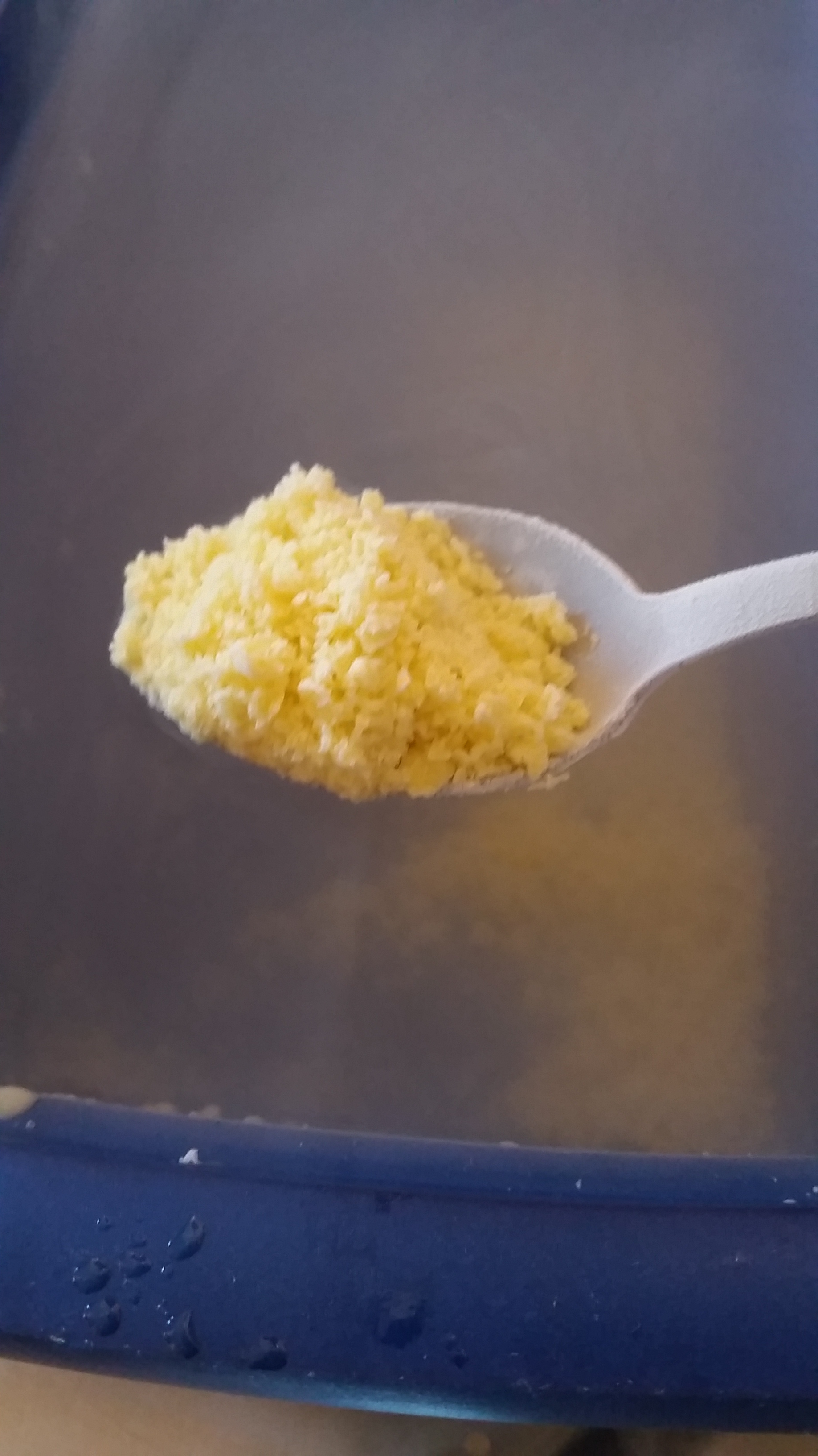 Diferent presentació, mateix procediment.